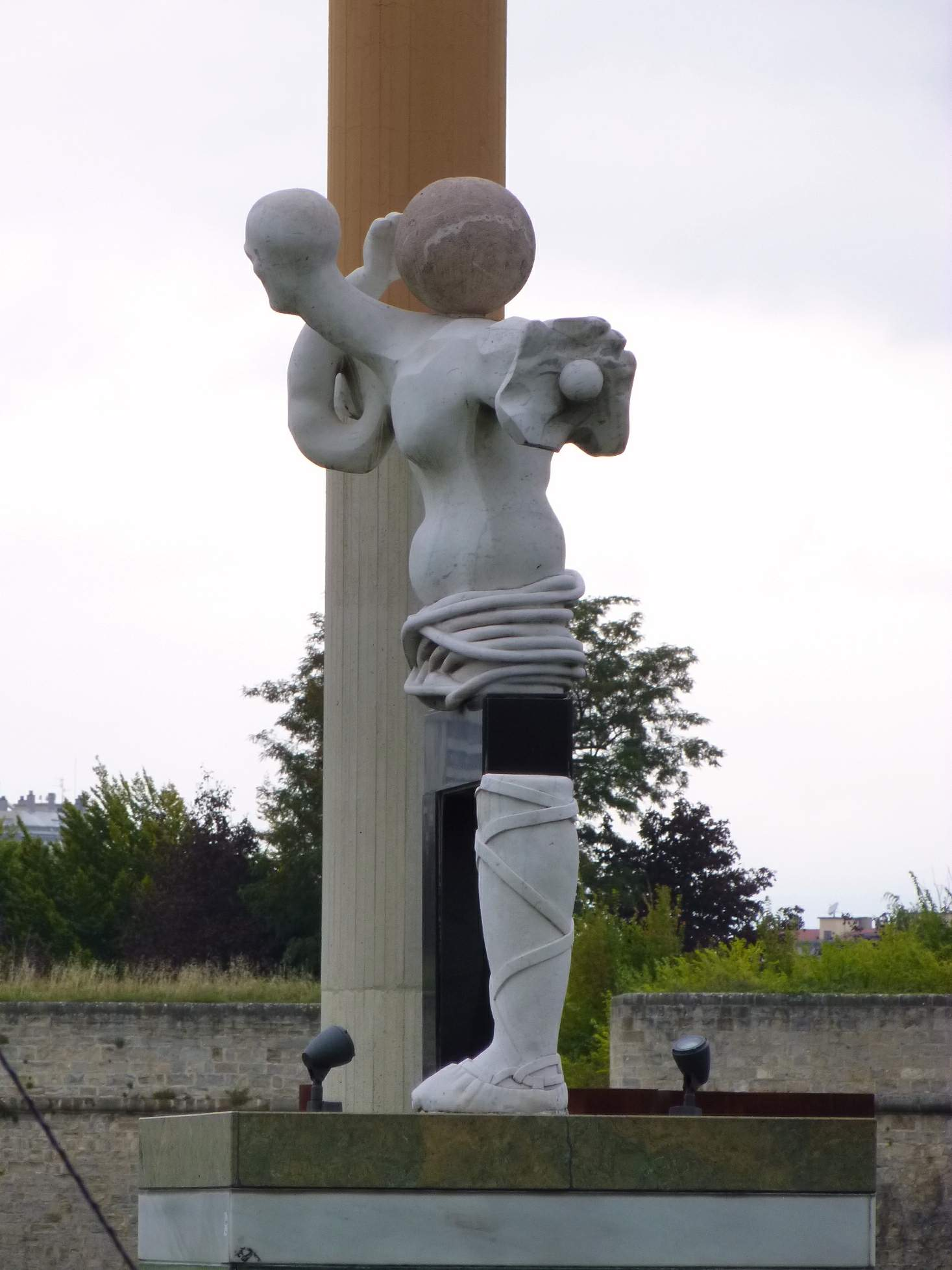 Plaza de la Paz (Pamplona)